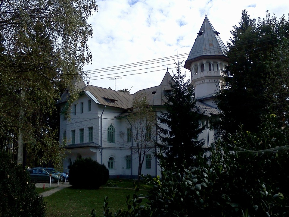 Conacul Filipescu Drăjneanu, azi Administrația Sanatoriului T.B.C. Drajna